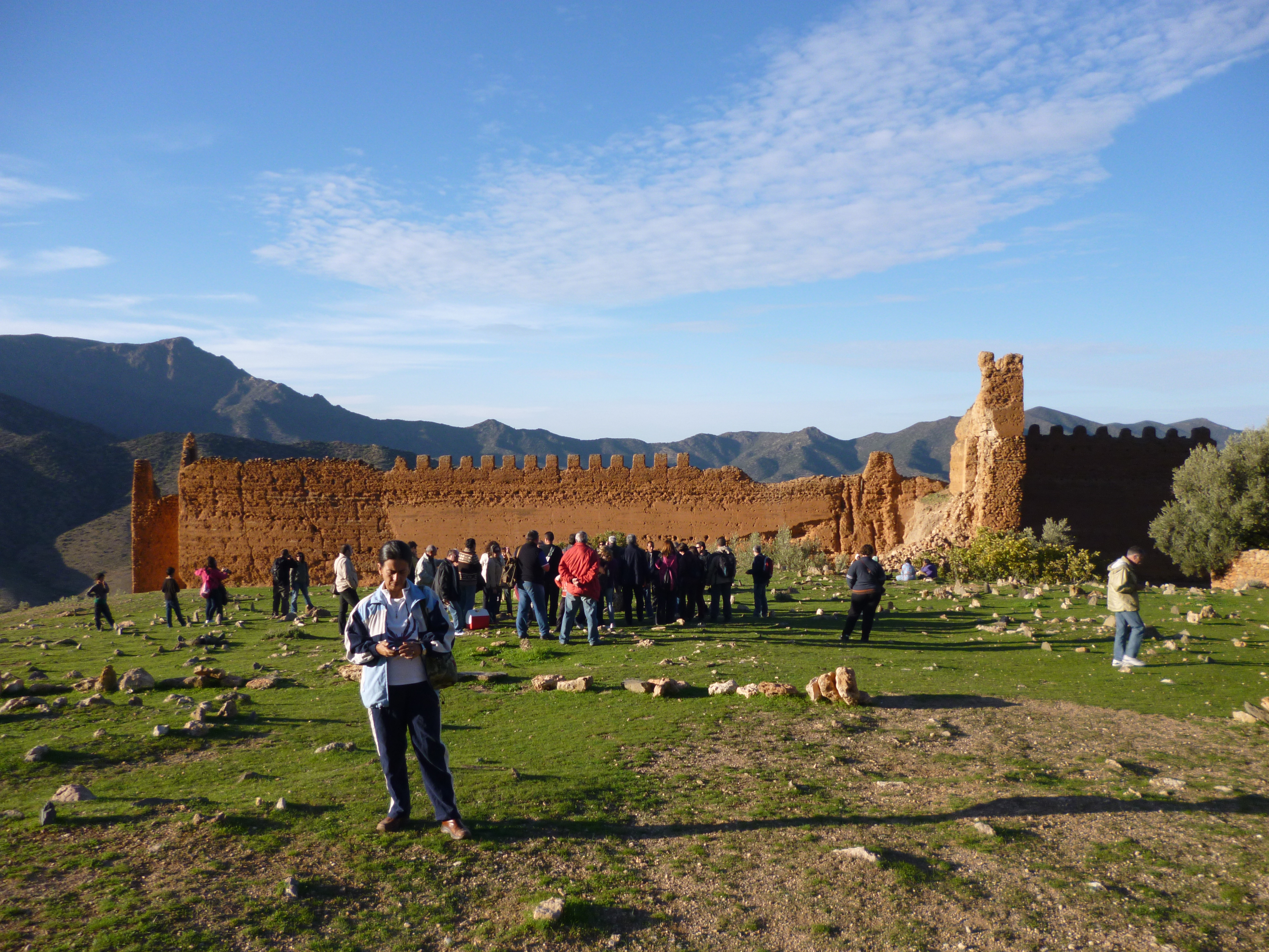 Debdou